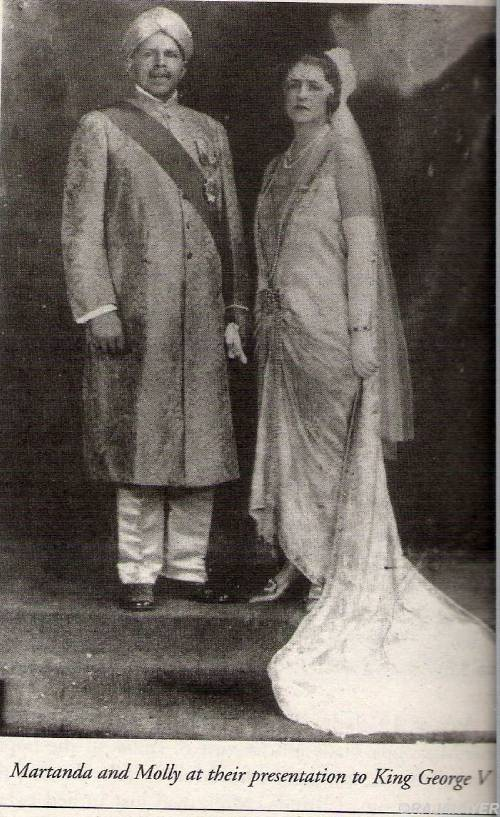 மார்த்தாண்ட பைரவத் தொண்டைமான்மற்றும் ராணி மோலி portrait from early 20th century. pd in india